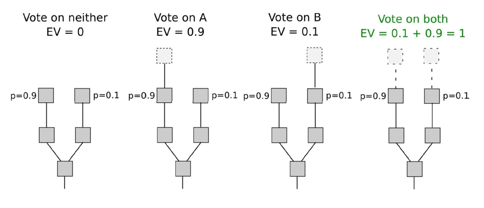 Validation par PoS